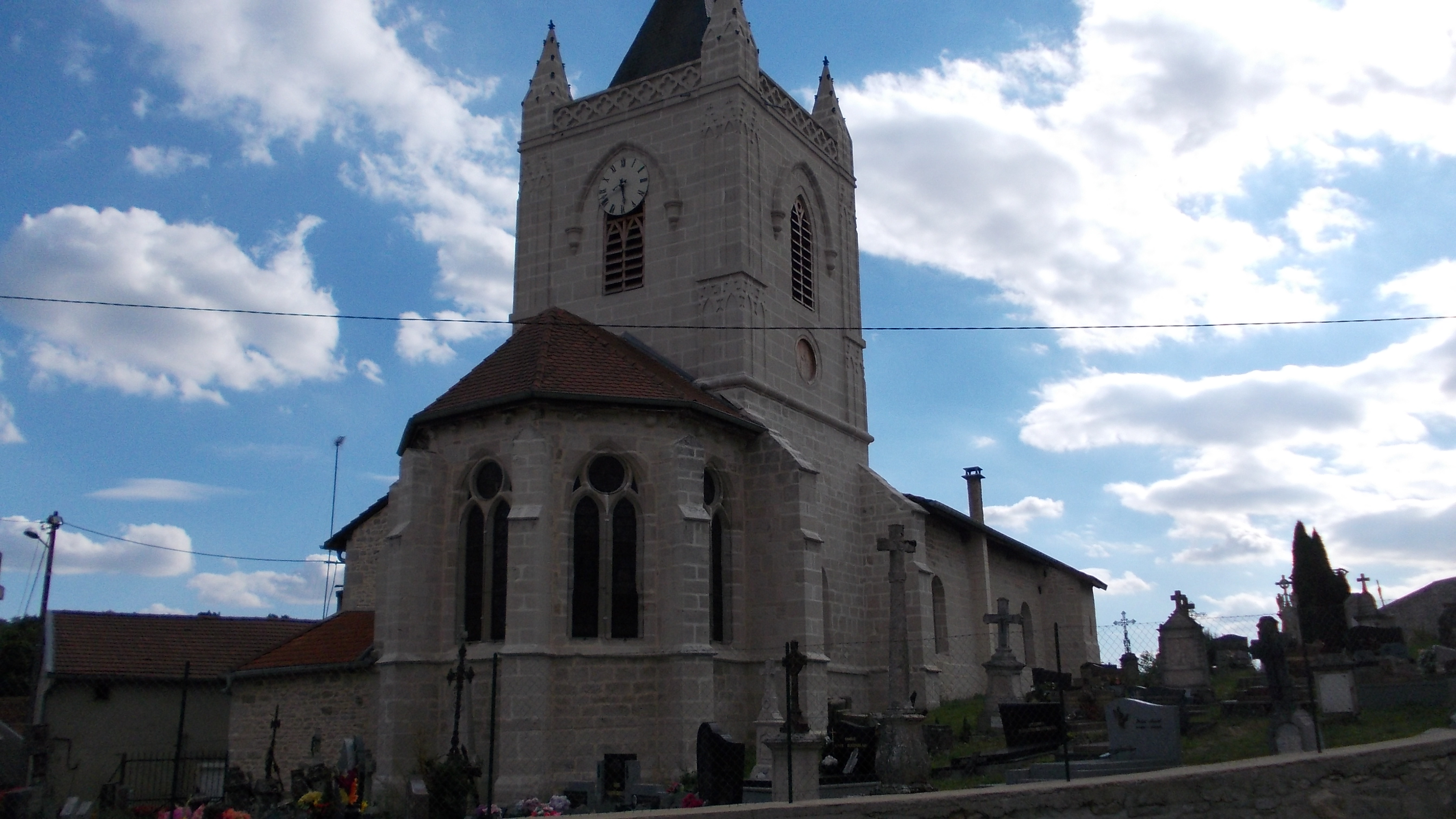 Église de la commune Couvertpuis